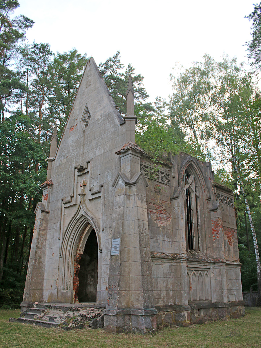 Грушаўка. Сядзіба Рэйтанаў. Капліца